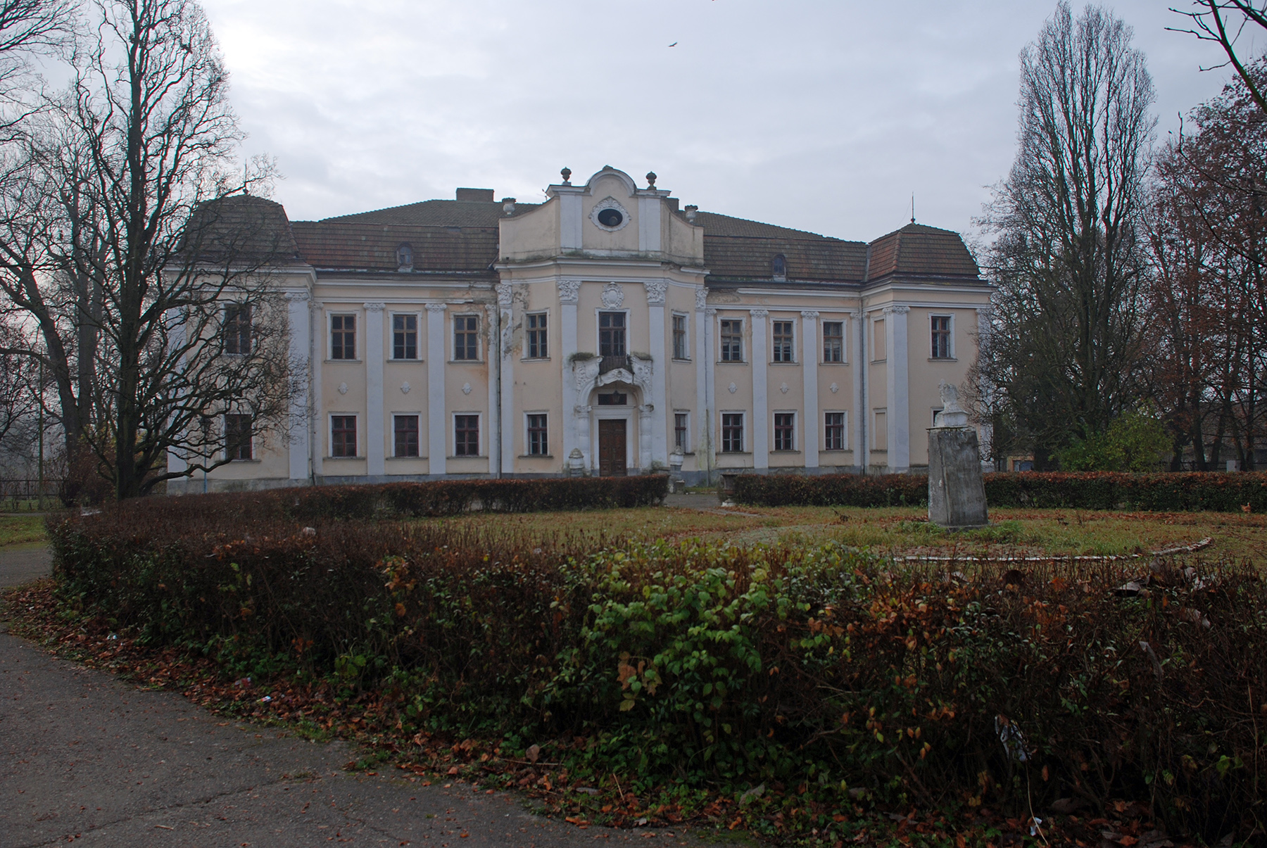 Садиба львівських архієпископів (мур.), с.Оброшине